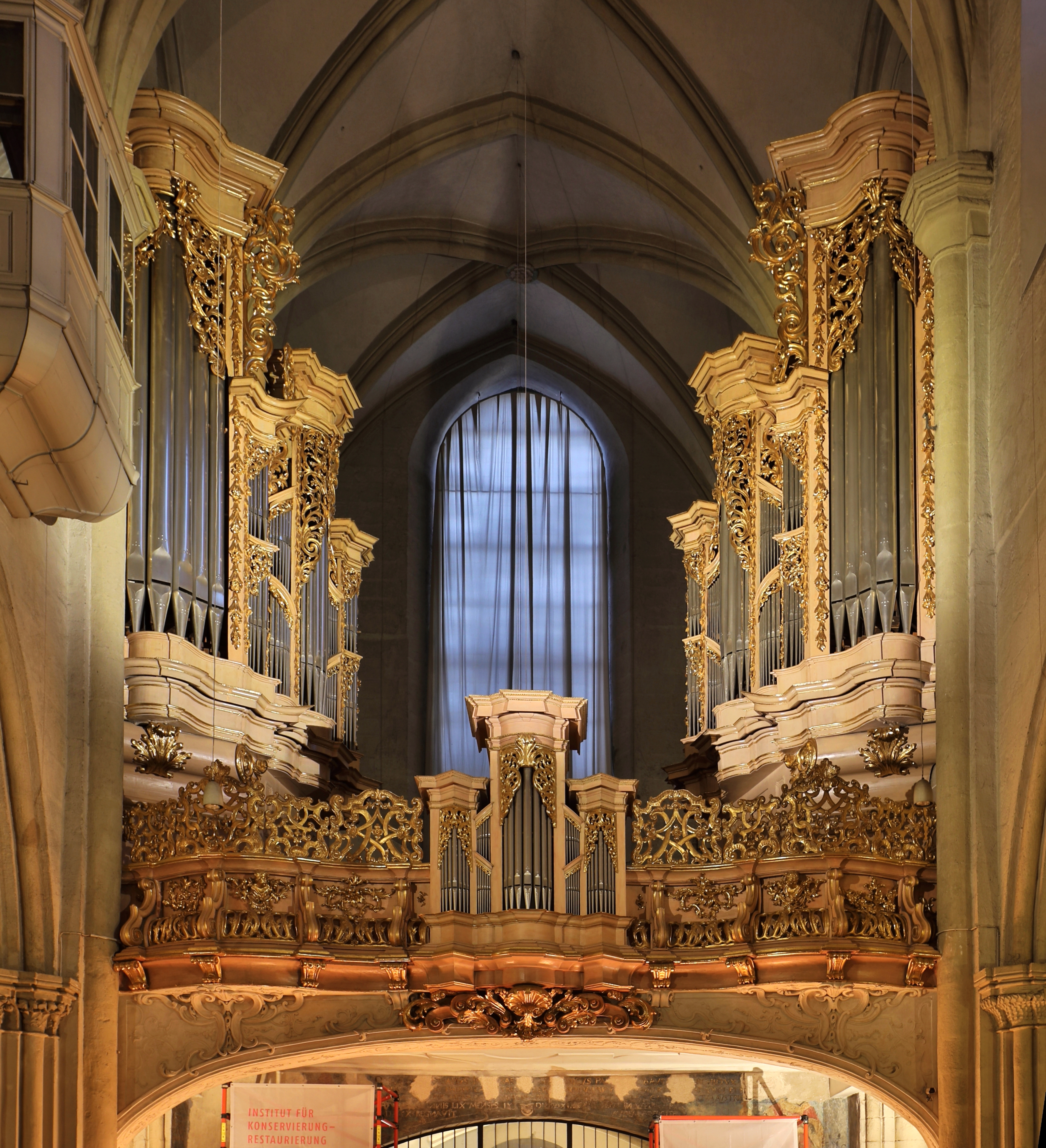 Orgel der Michaelerkirche im 1. Bezirk der österreichischen Bundeshauptstadt Wien.Die heutige Pfarr- und Klosterkirche der Salvatorianer wurde 1220 errichtet und war bereits 1288 einer der 3 Stadtpfarrkirchen. Nach mehreren Großbränden und einem Erdbeben wurde die Kirche mehrfach umgebaut.Die Orgel mit 40 Register, 3 Manuale und Pedal ist Wiens größte und fast vollständig erhaltene Barockorgel. Sie wurde von Johann David Sieber gefertigt und am 24. Jänner 1714 in Gegenwart von Kaiser Karl den Vl. erstmalig bespielt. Wegen einer unzulänglichen Emporekonstruktion wurde sie 1742 von Gottfried Sonnholz umgebaut (Rückpositiv wurde von der Orgelbrüstung entfernt und als Hinterwerk zum Hauptgehäuse hin versetzt). 1986/87 erfolgte durch Jürgen Ahrend Orgelbau ein Rückbau in den Originalzustand.